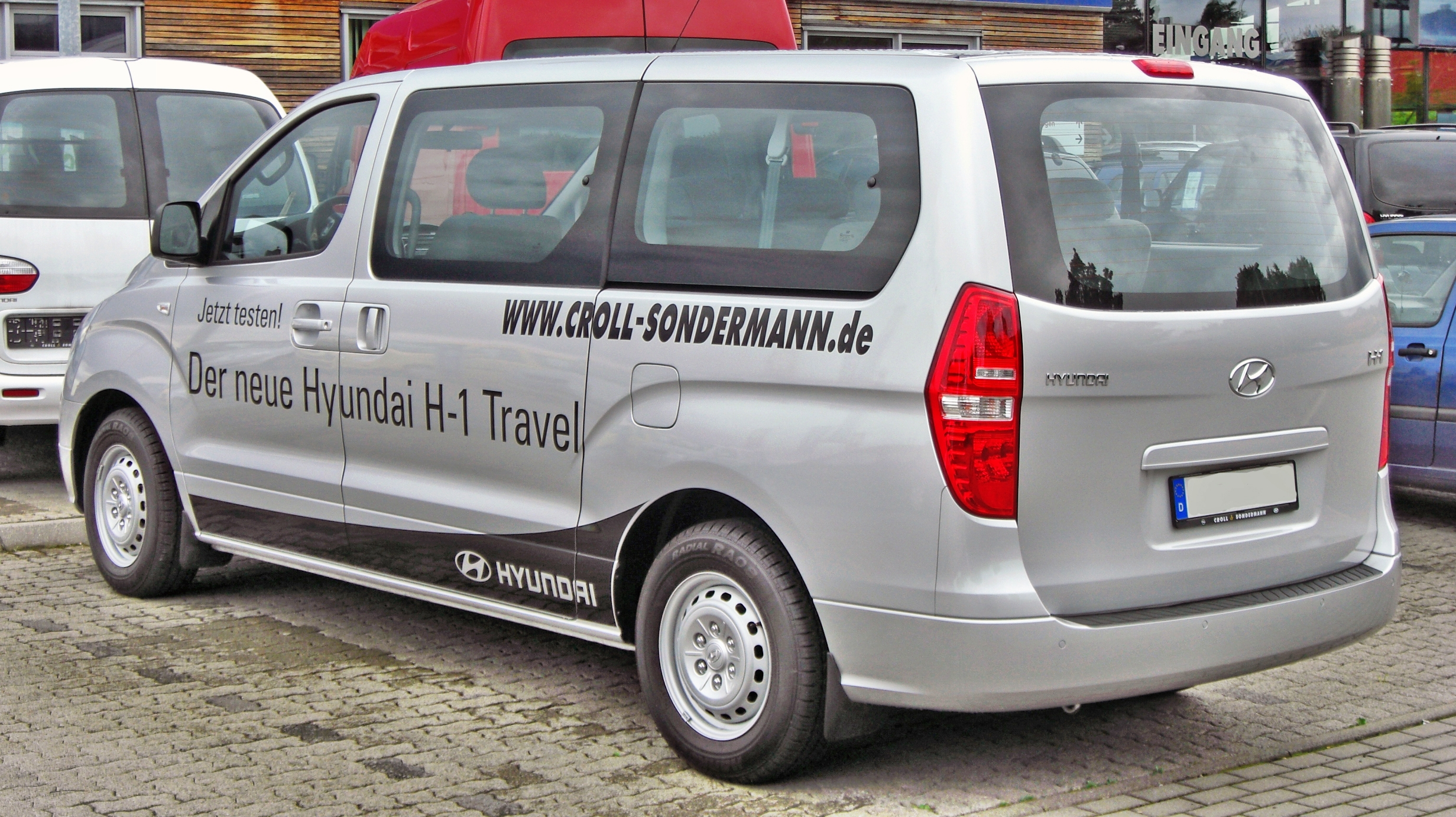 Hyundai H-1 Travel